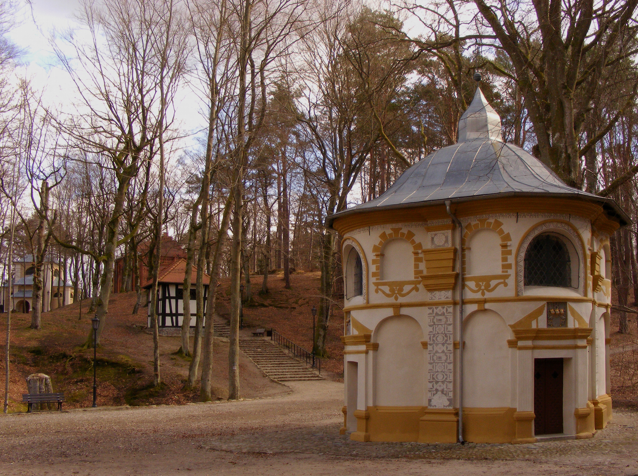 założenie architektoniczno-krajobrazowe Kalwarii Wejherowskiej